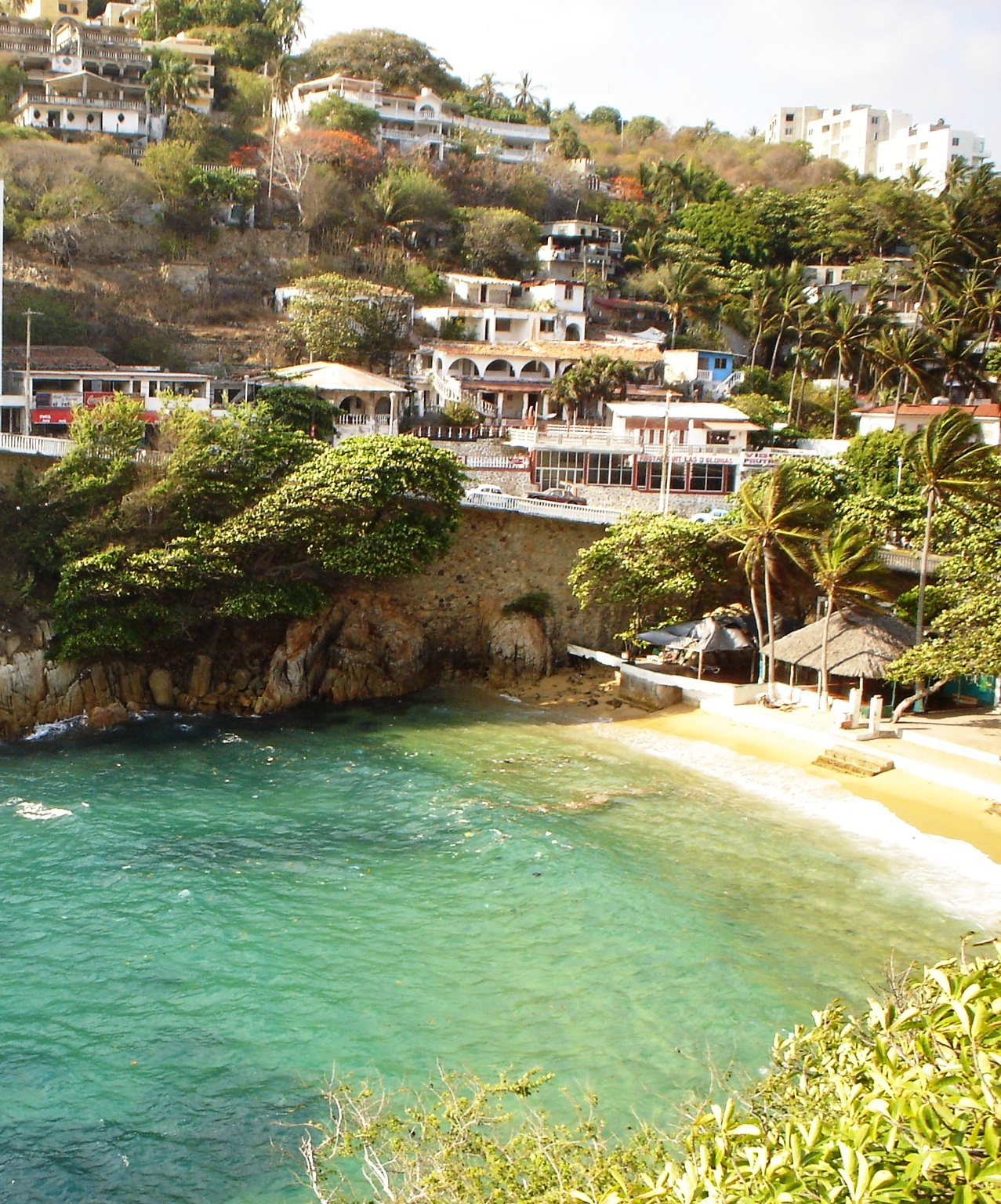 Playa Langosta en la ciudad de Acapulco, Guerrero, en México.